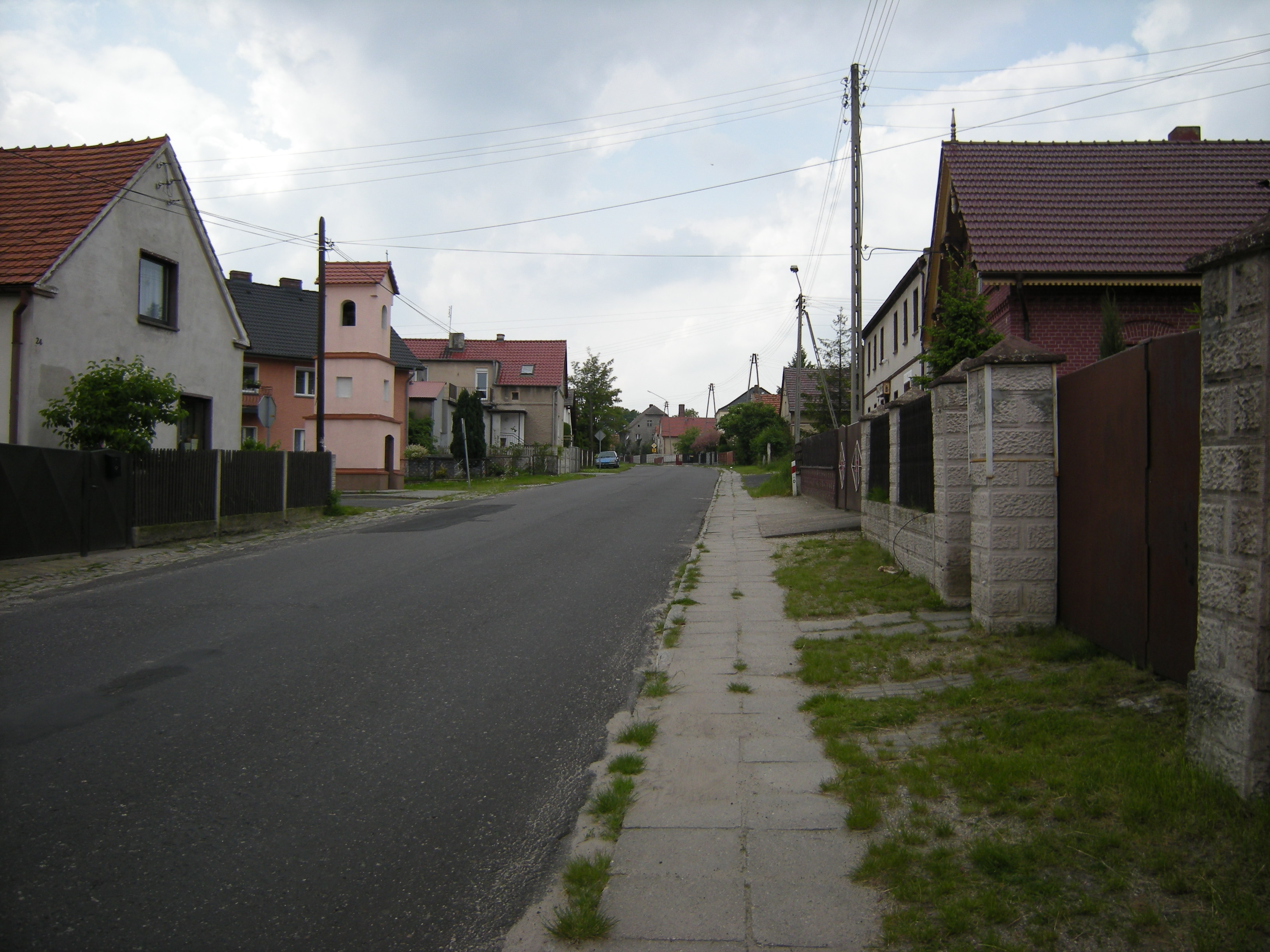 Ortsmitte von Bowallno (Wawelno) (2010)